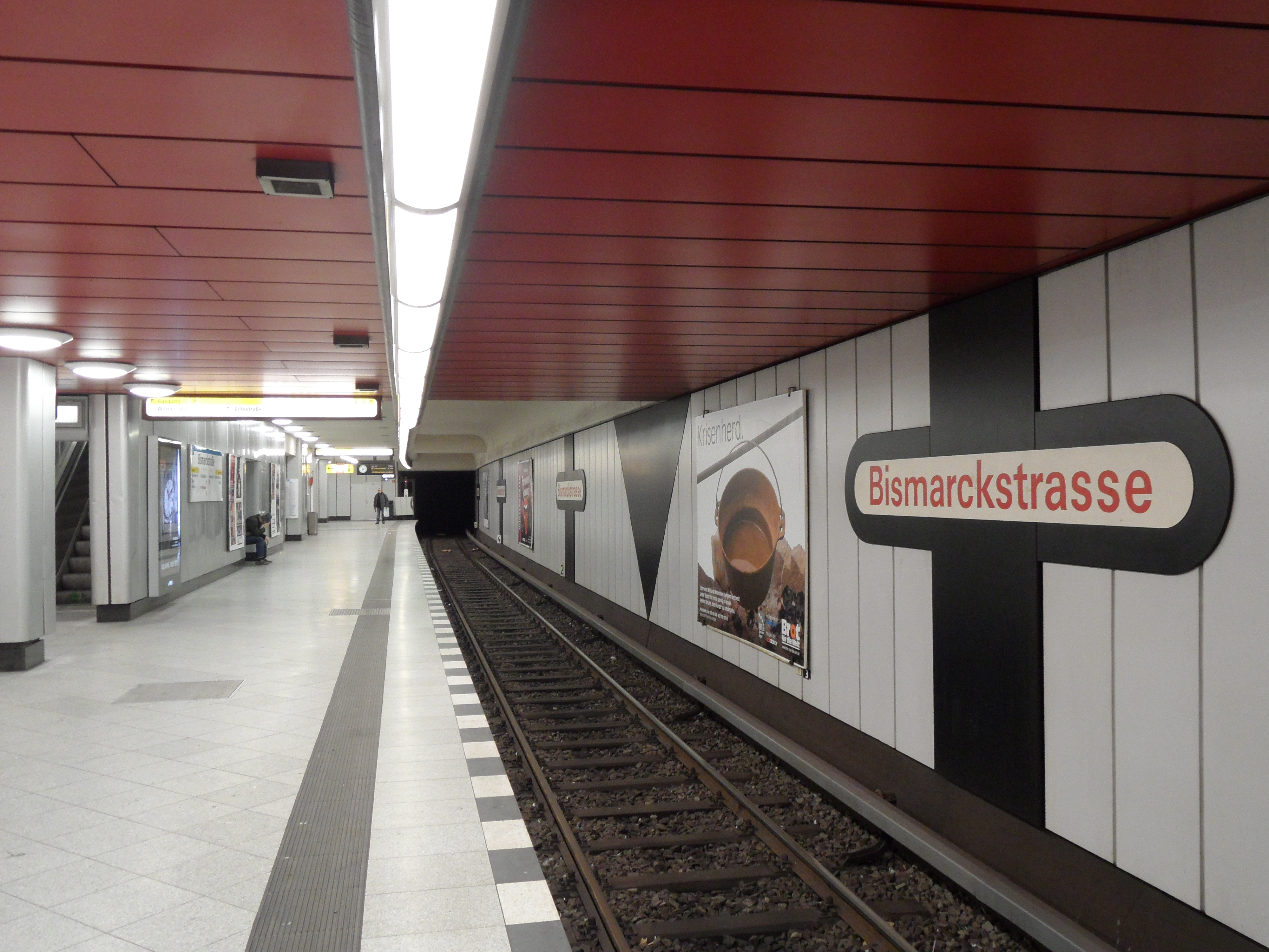 Berlin - U-Bahnhof Bismarckstraße - Linien U2 und U7